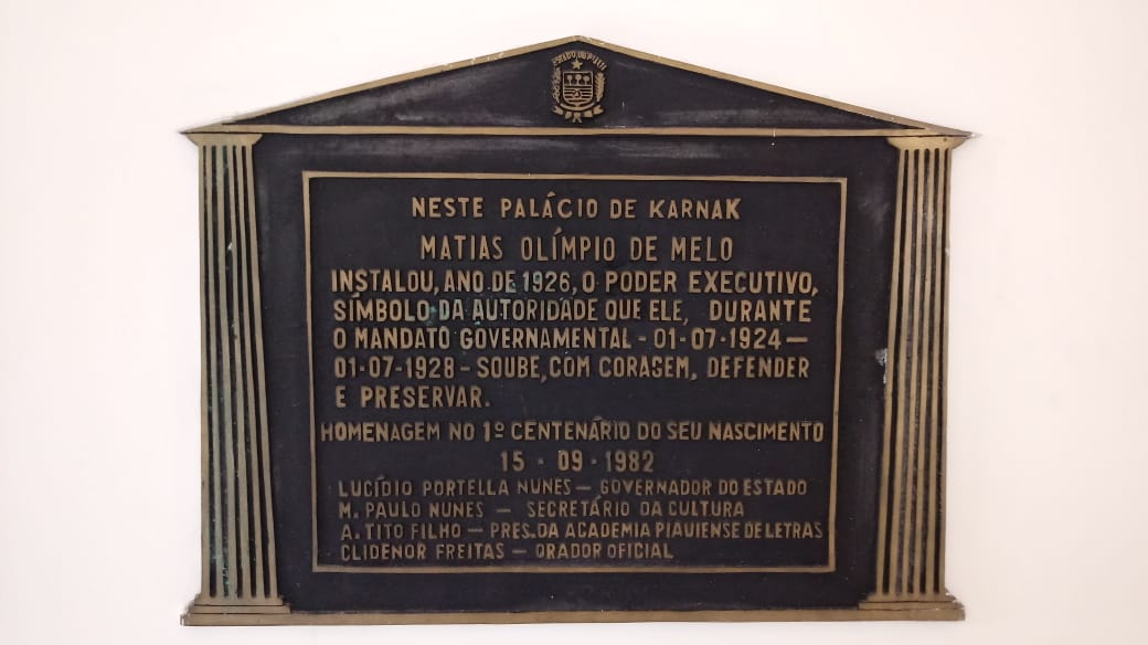 Placa com histórico do Palácio do Governador do Piauí.